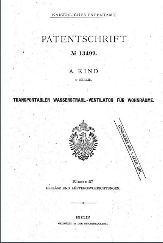 Patentschrift 1880